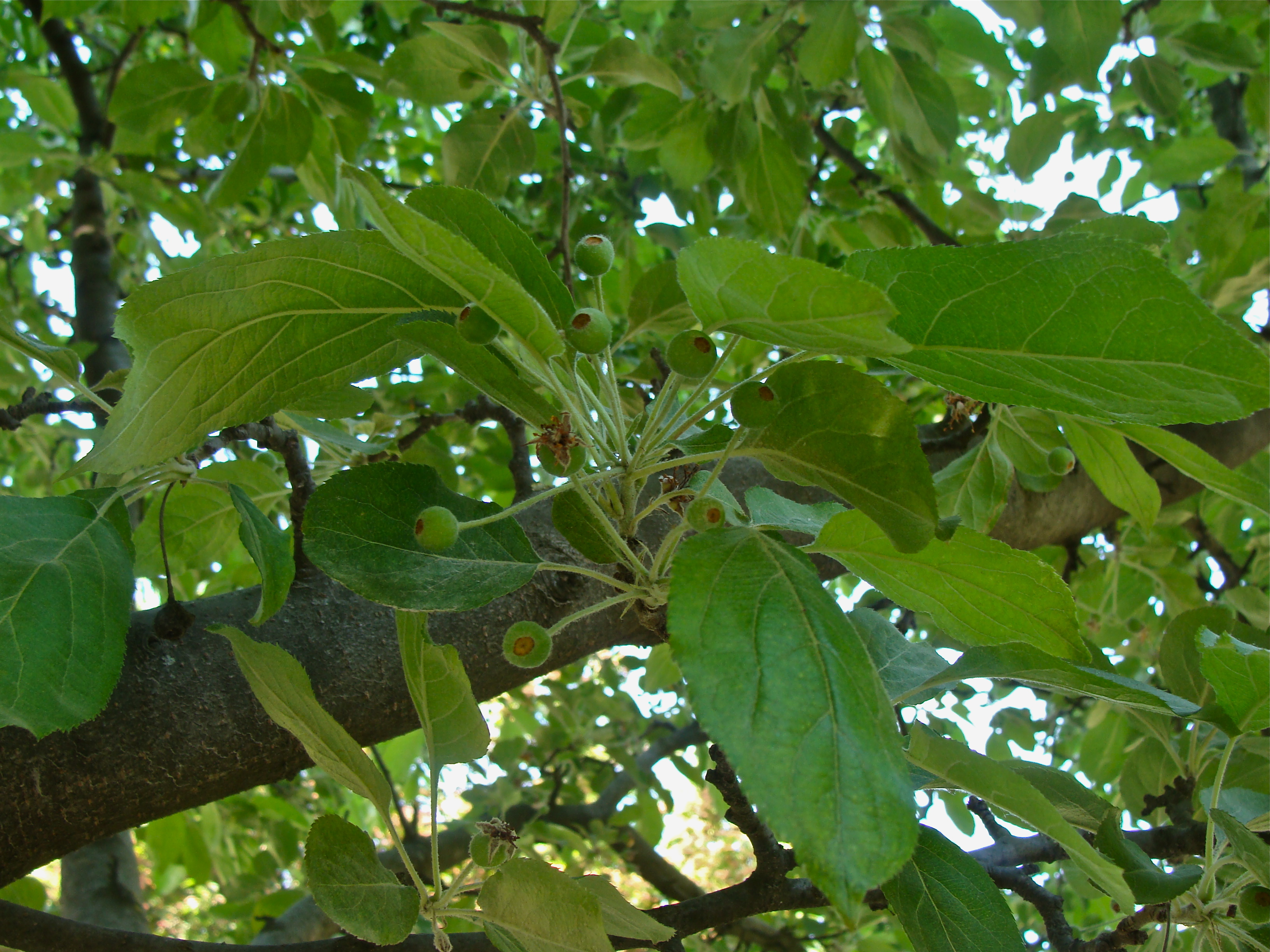 Malus hupehensis (Pampanini) Rehder, Jardin des Plantes, Paris, France